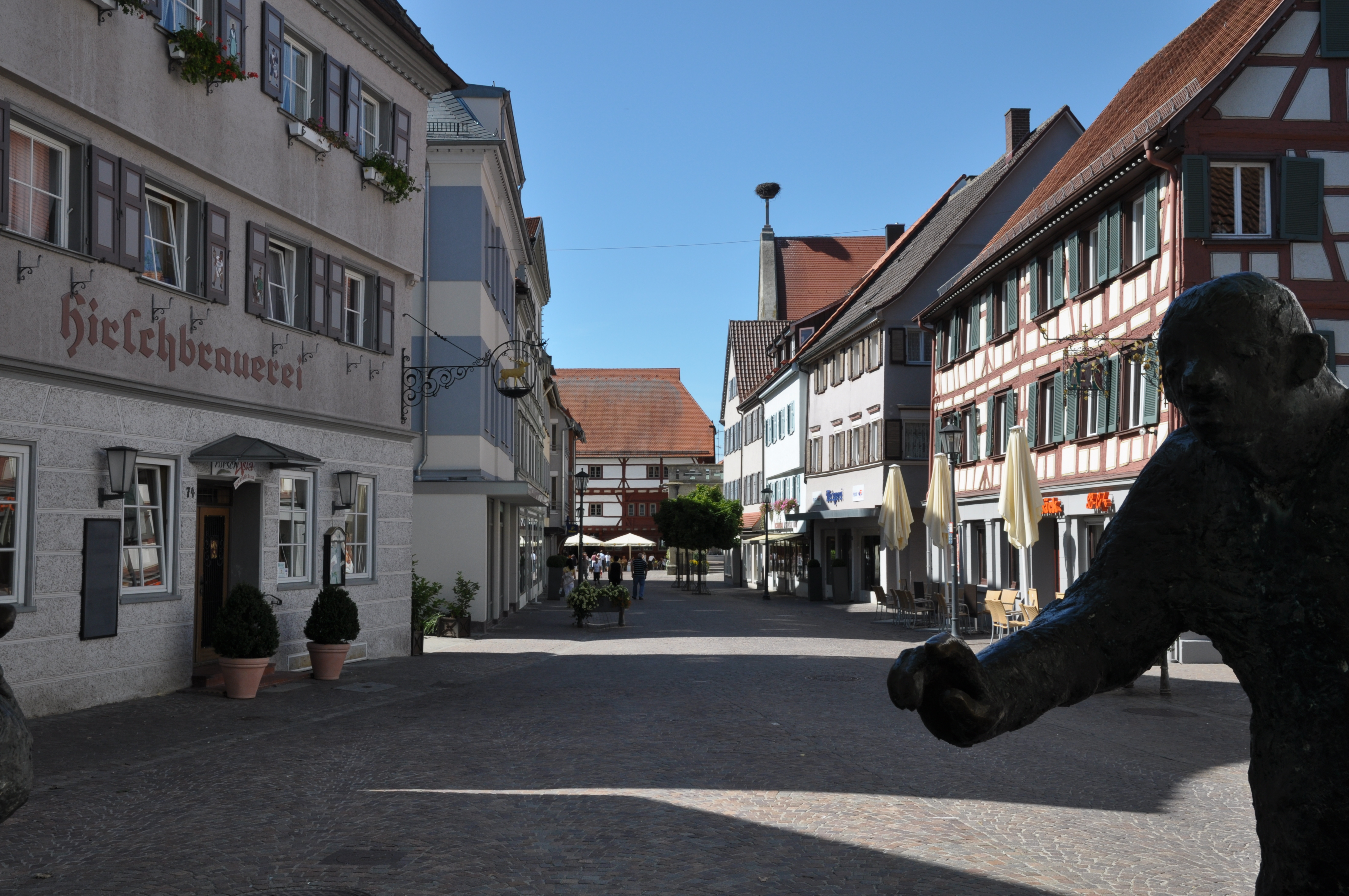 Hauptstraße vom Luegebrunnen, Bad Saulgau